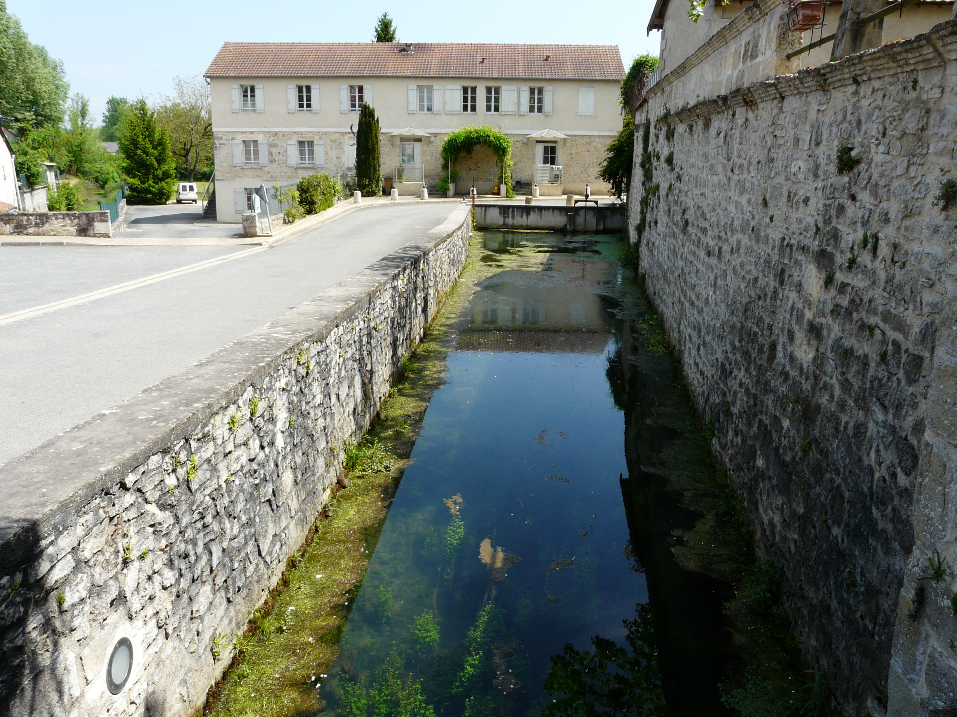 Retenue d'eau du Cern qui alimentait un moulin à eau, village d'Azerat, Dordogne, France.